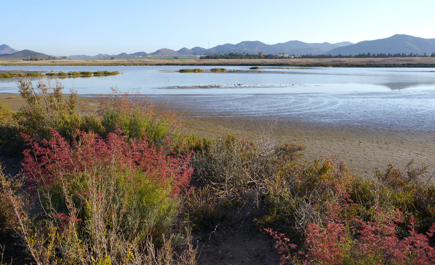 Saladar de Lo Poyo, espacio protegido en el entorno del Mar Menor, Cartagena, España.